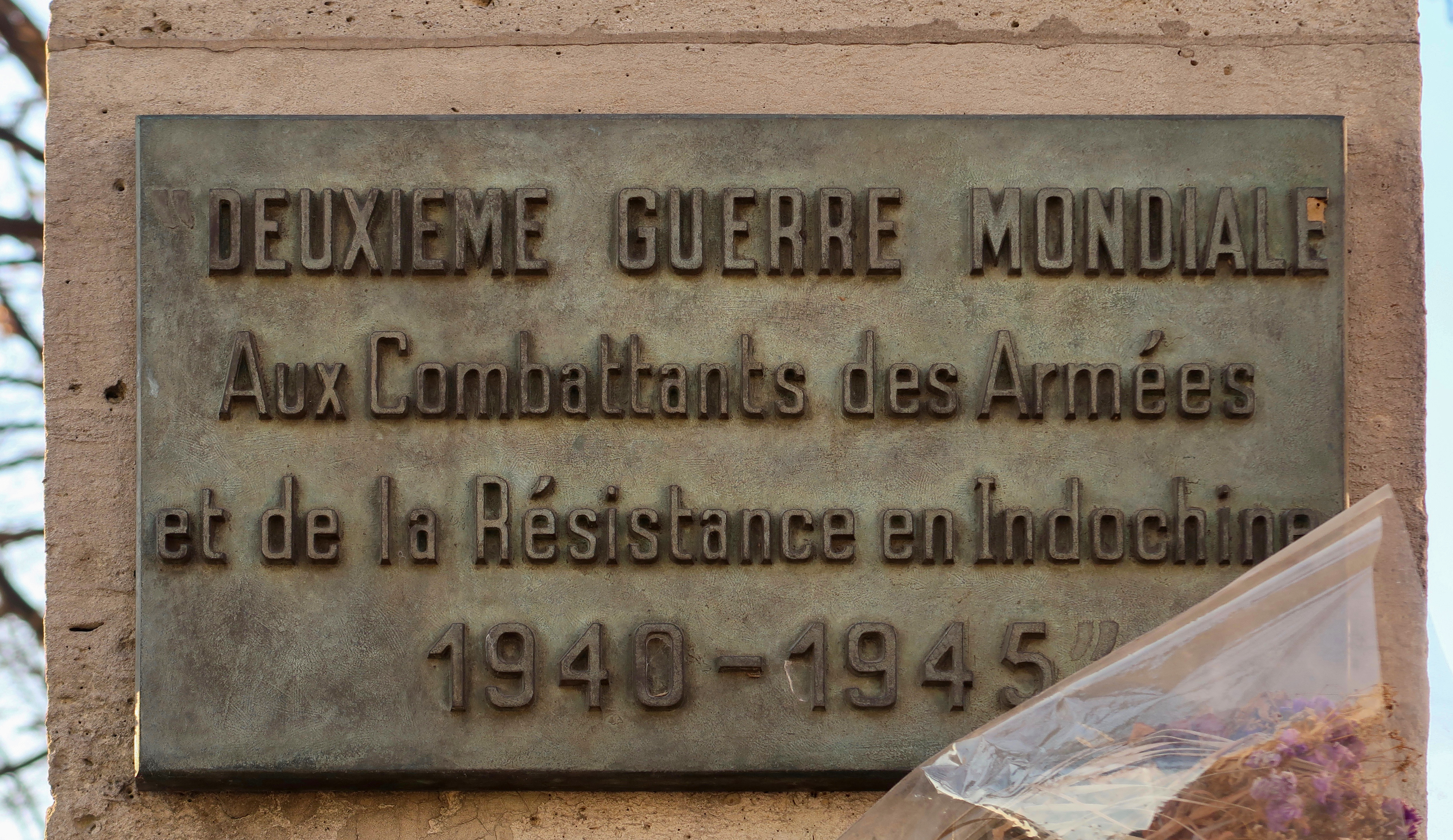 Plaque en hommage au combattants des armées et de la résistance en Indochine, avenue du Général-Lemonnier, au croisement avec la rue de Rivoli (Paris, 1er).